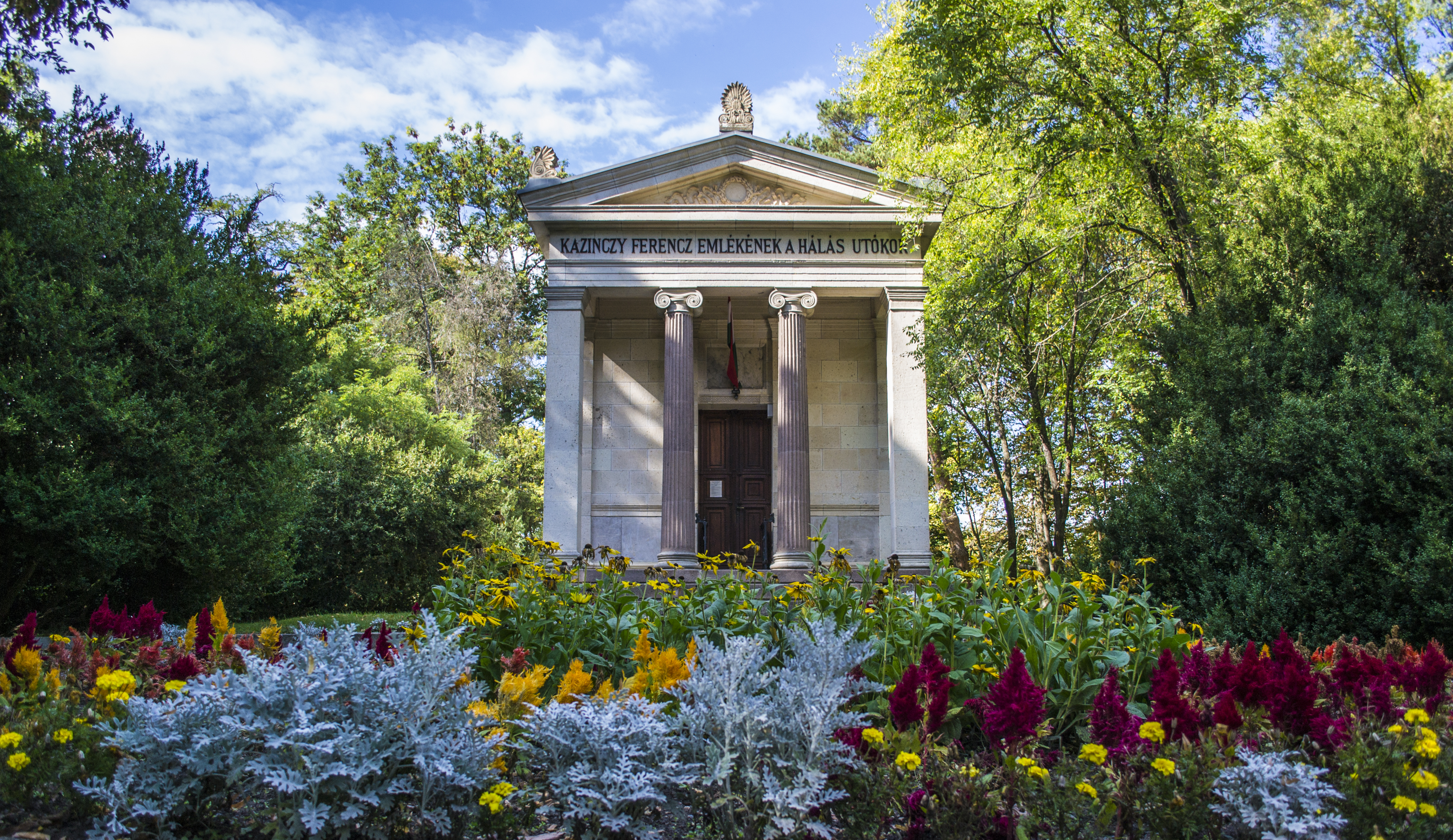 Kazinczy-emléképület This is a photo of a monument in Hungary. Identifier: 90405